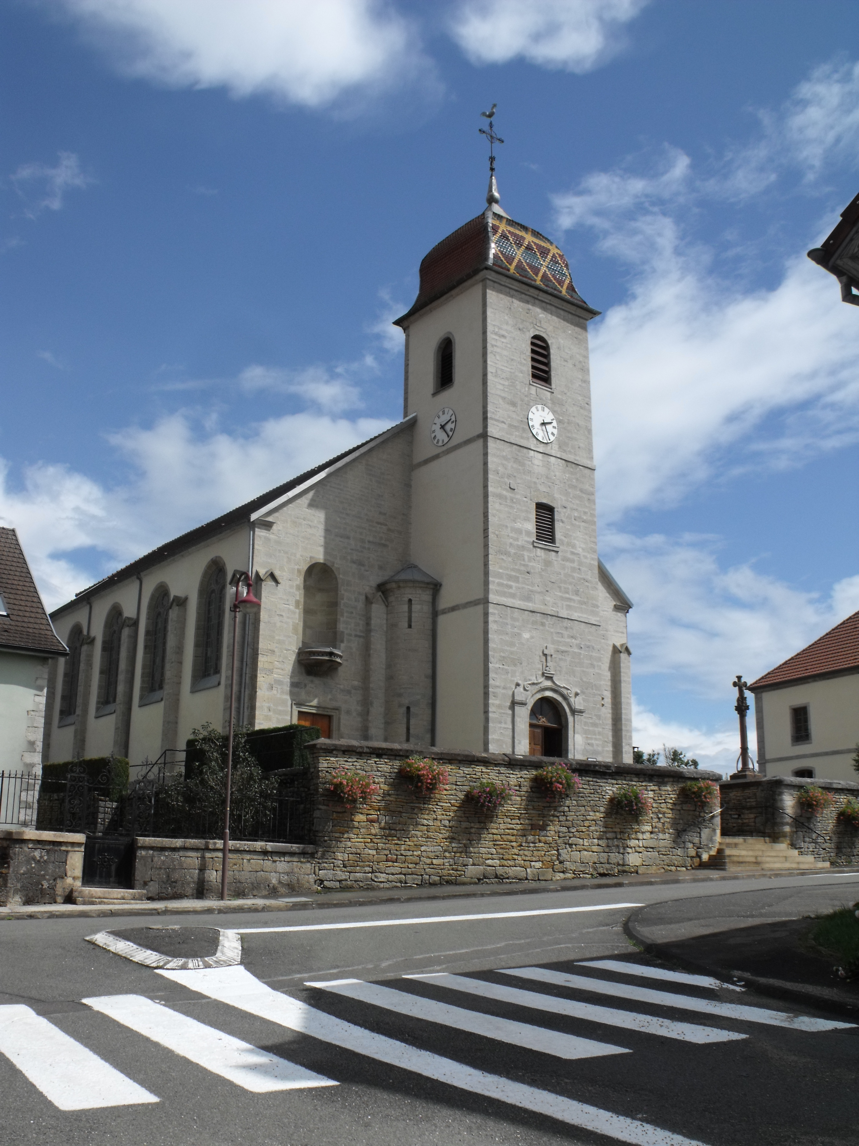 Eglise d'Arcey, Doubs, France